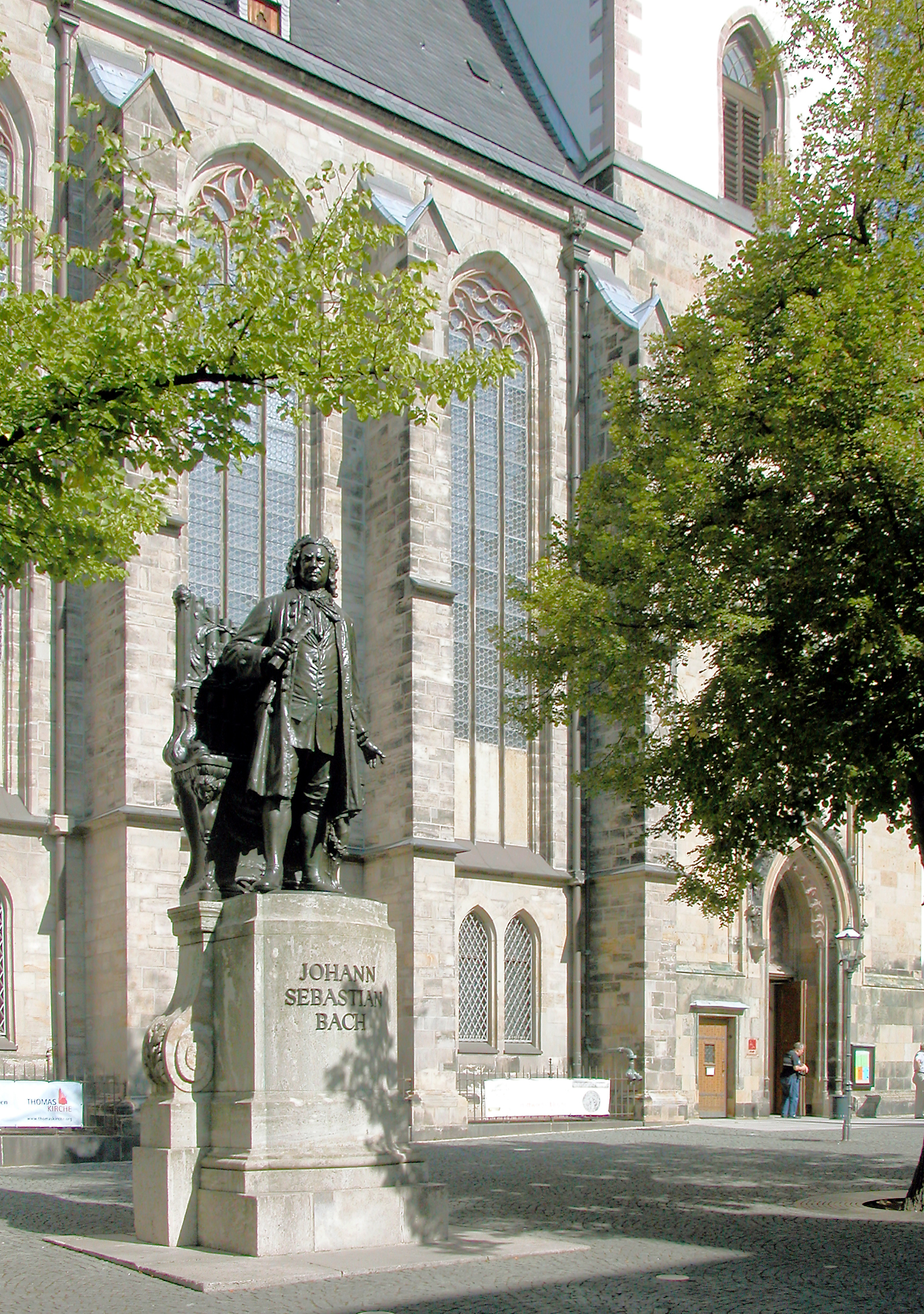 08.09.2009 04109 Leipzig, Thomaskirchhof 18 (GMP: 51.339329,12.372520): Johann Sebastian Bach Denkmal vor der Südfassade der Thomaskirche.[DSCN38926.TIF]20090908315DR.JPG(c)Blobelt